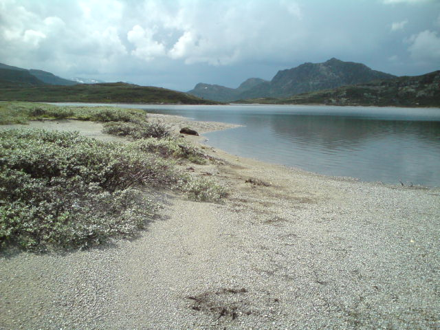 Bygdin i Øystre Slidre.